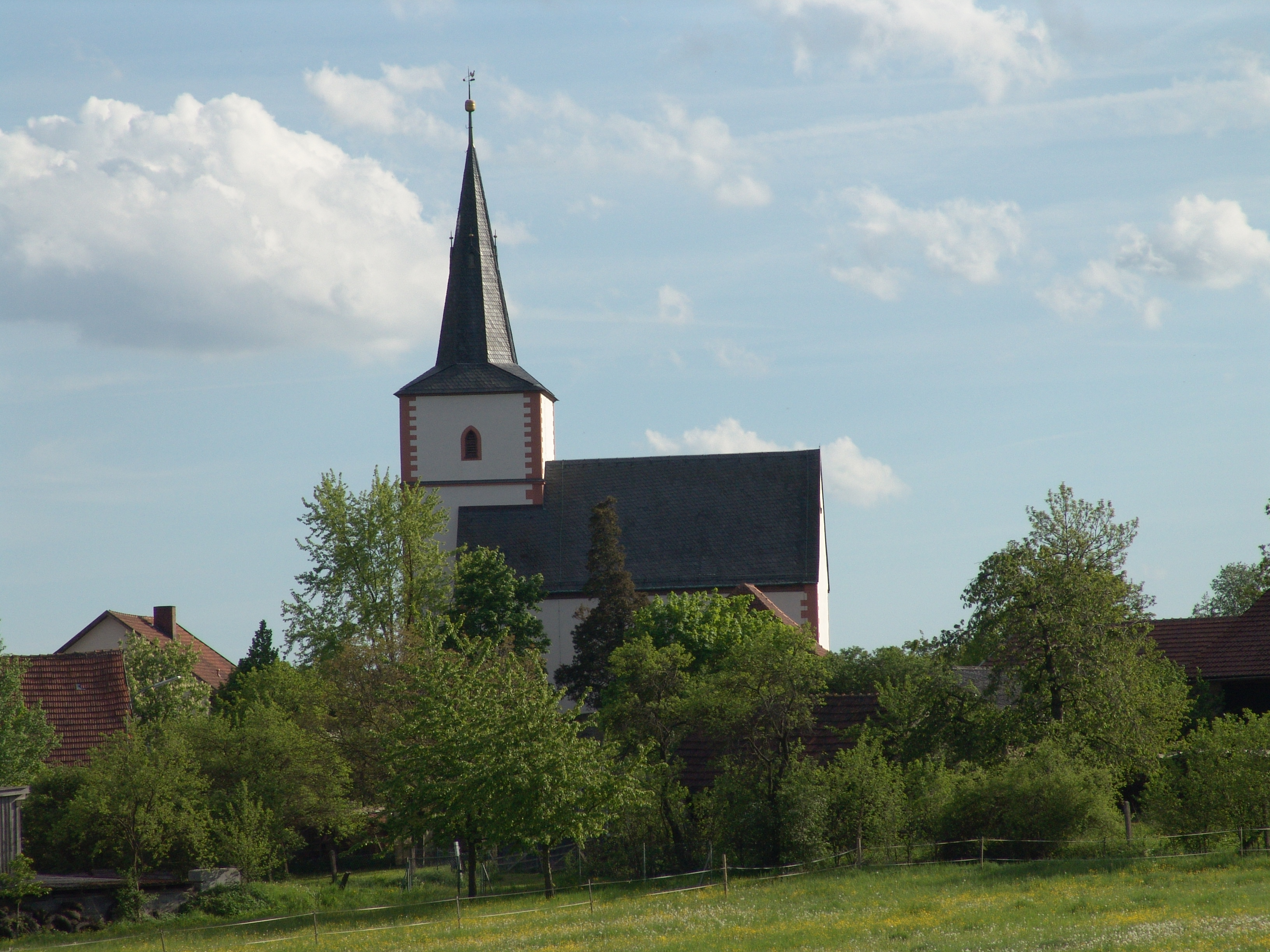 evang.-luth. Kirche in Stetten